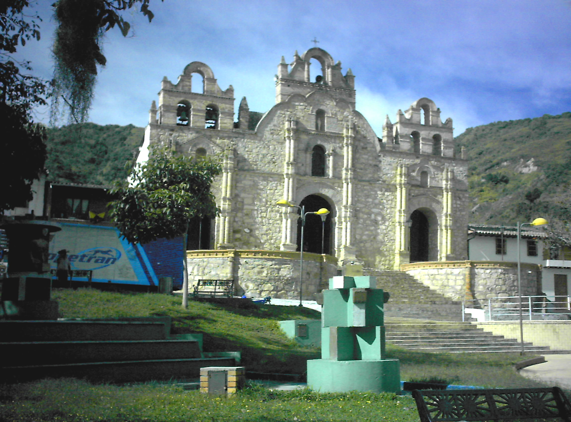 Iglesia realizada totalmente en piedra en el municipio de aratoca, santander , colombia